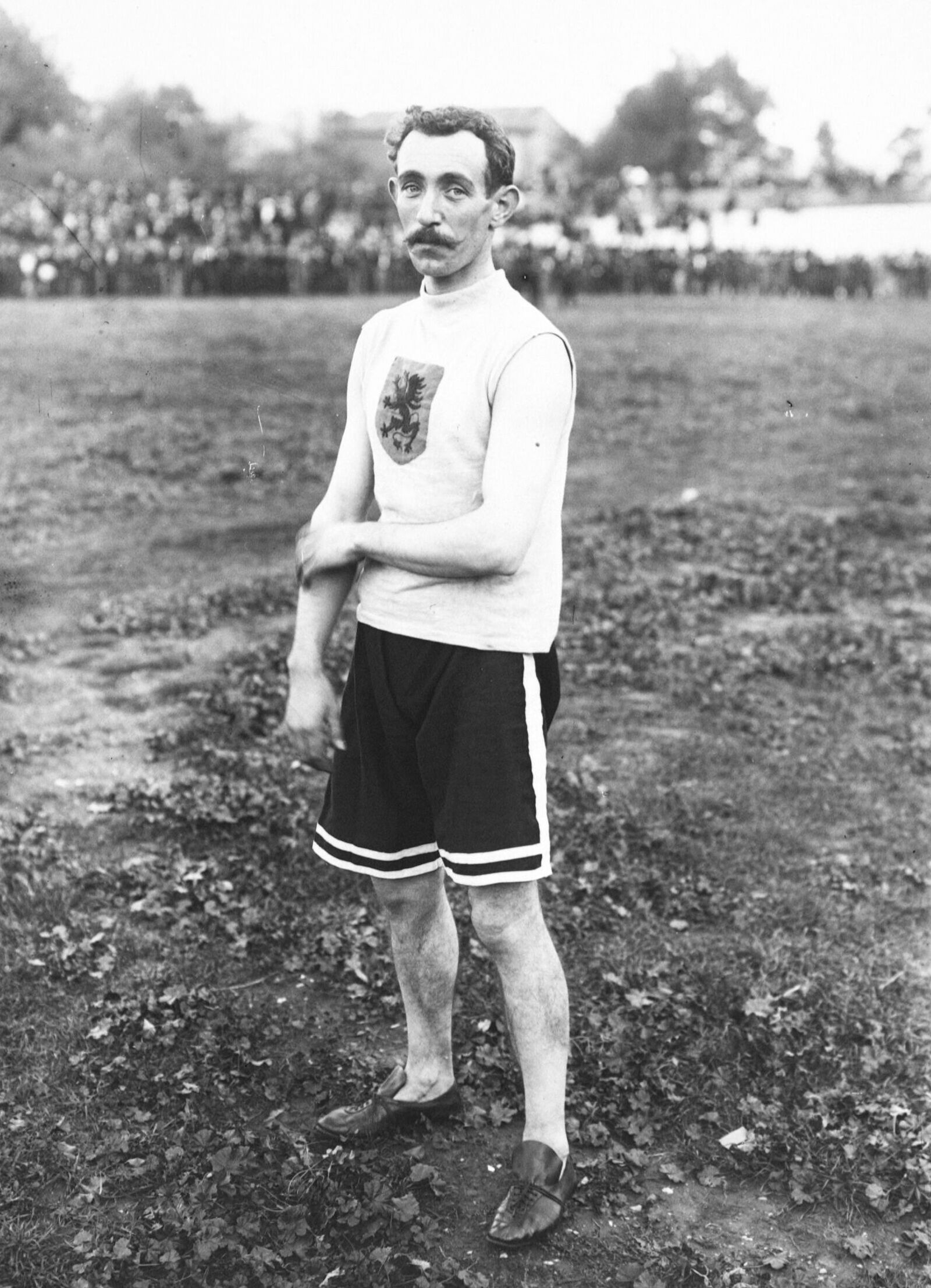 Gonder, saut à la perche : [photographie de presse] / [Agence Rol]